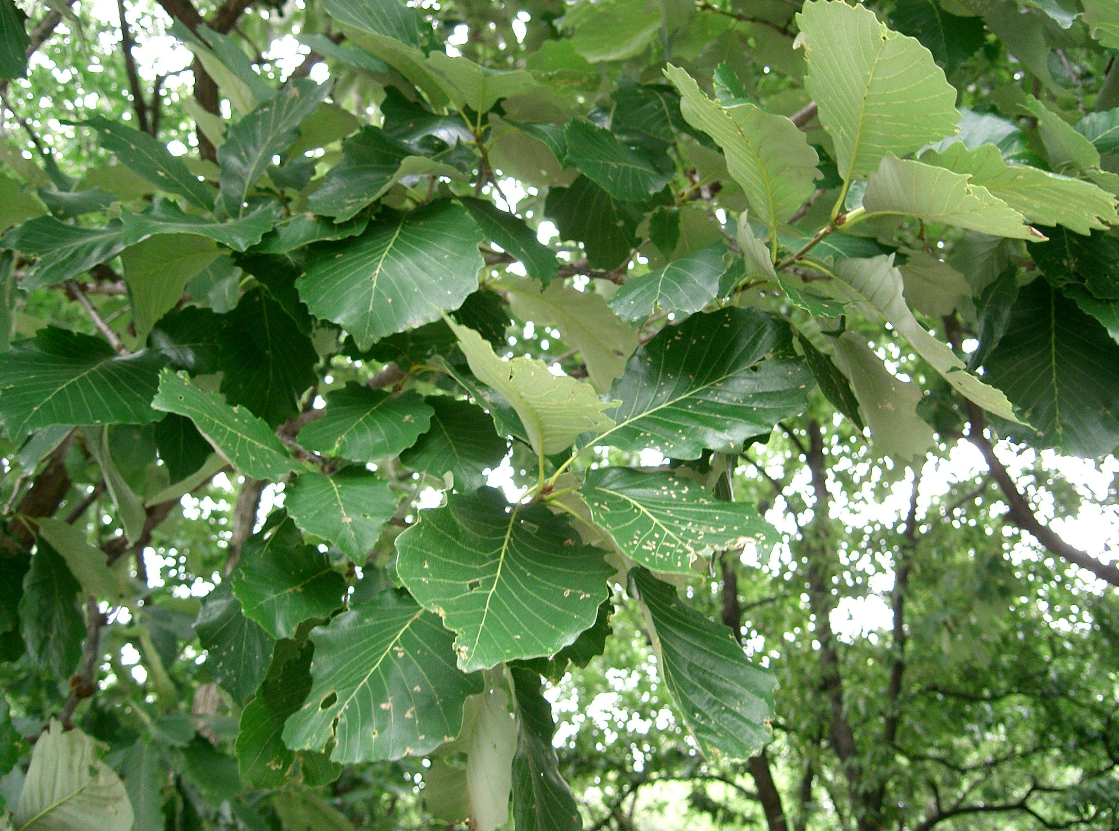 Scientific name Quercus aliena